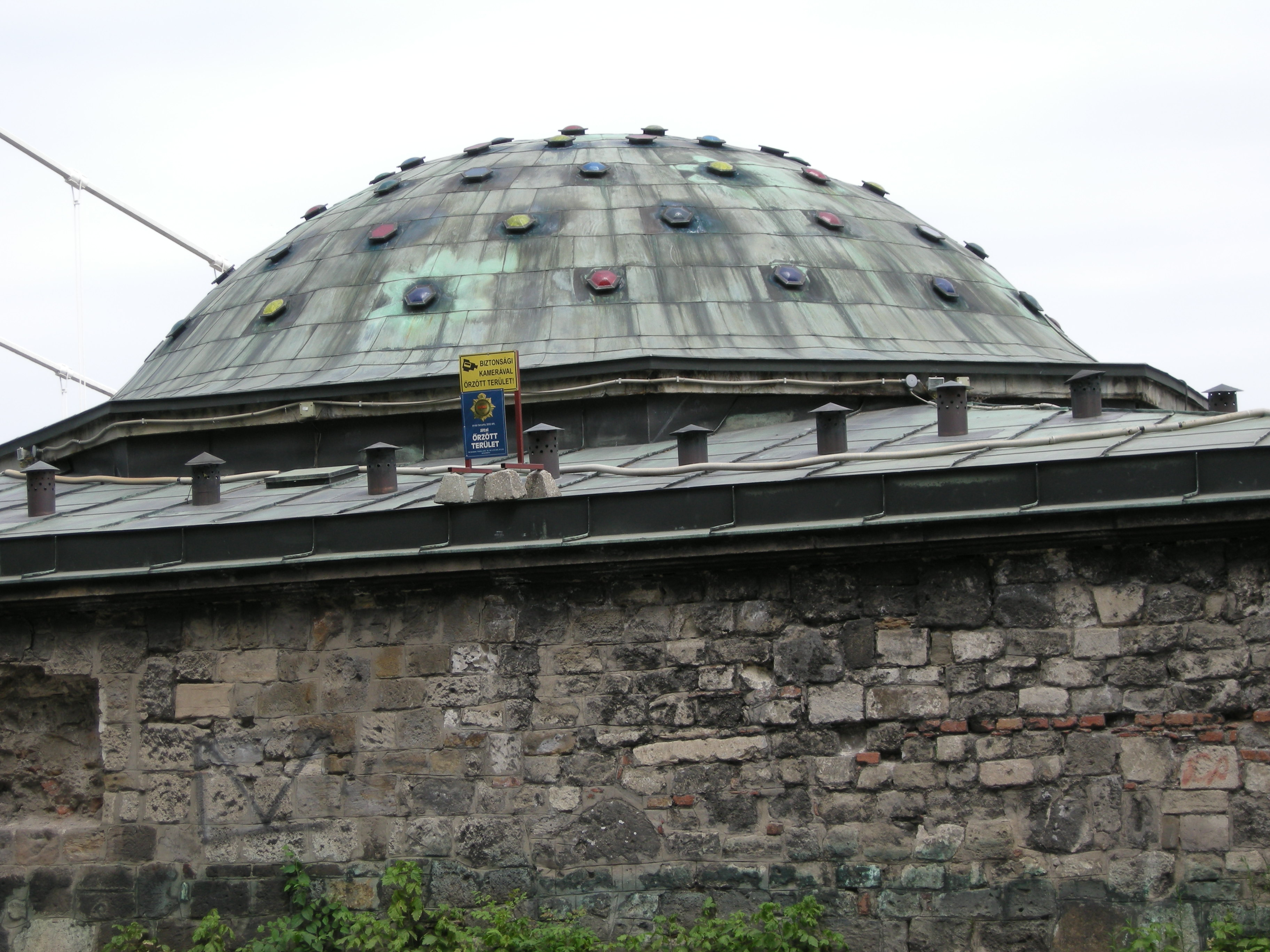 Budapest